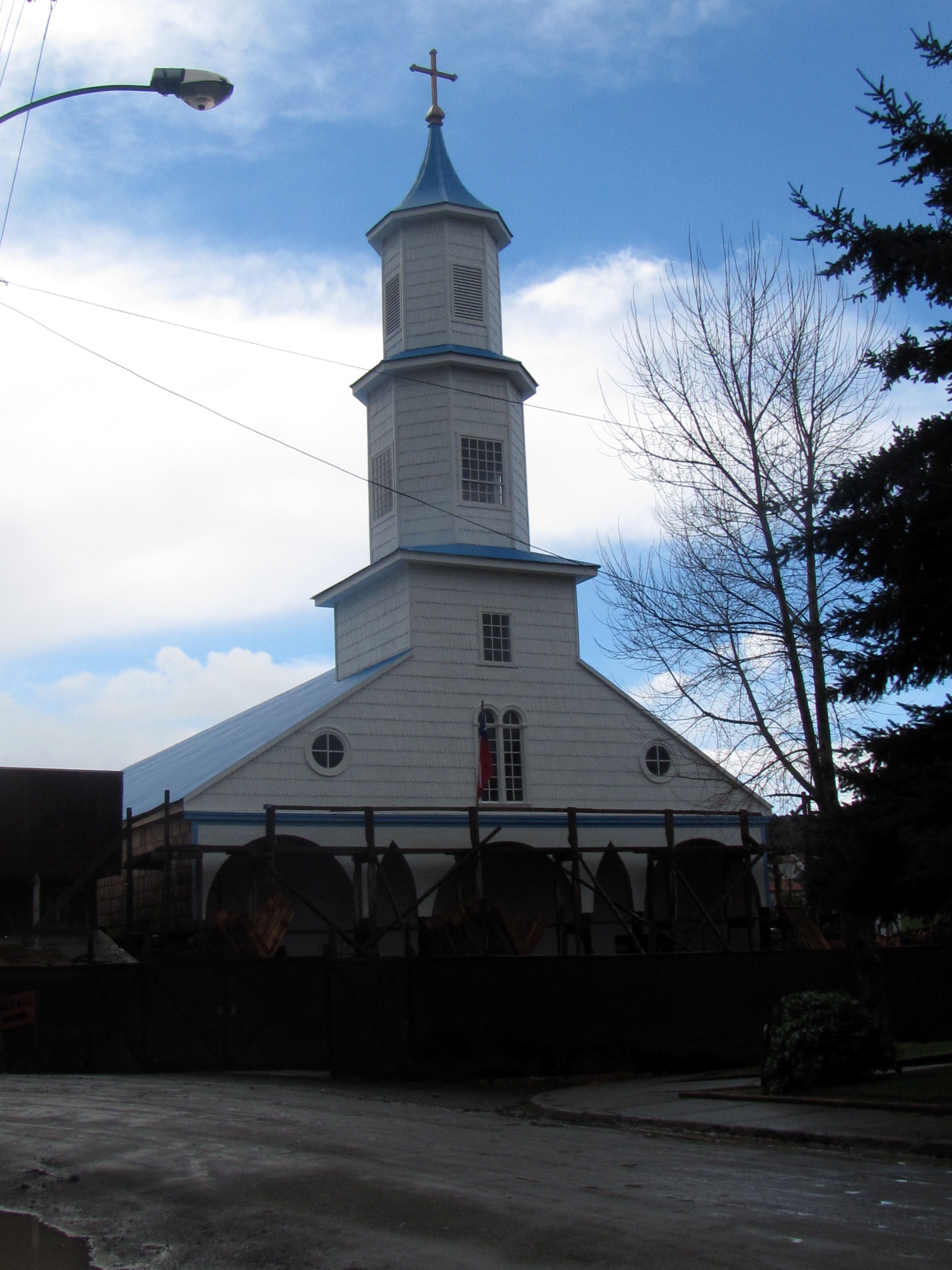 Iglesia Santa María, Rilán, comuna de Castro, archipiélago de Chiloé, Chile This is a photo of a national monument in Chile: 162